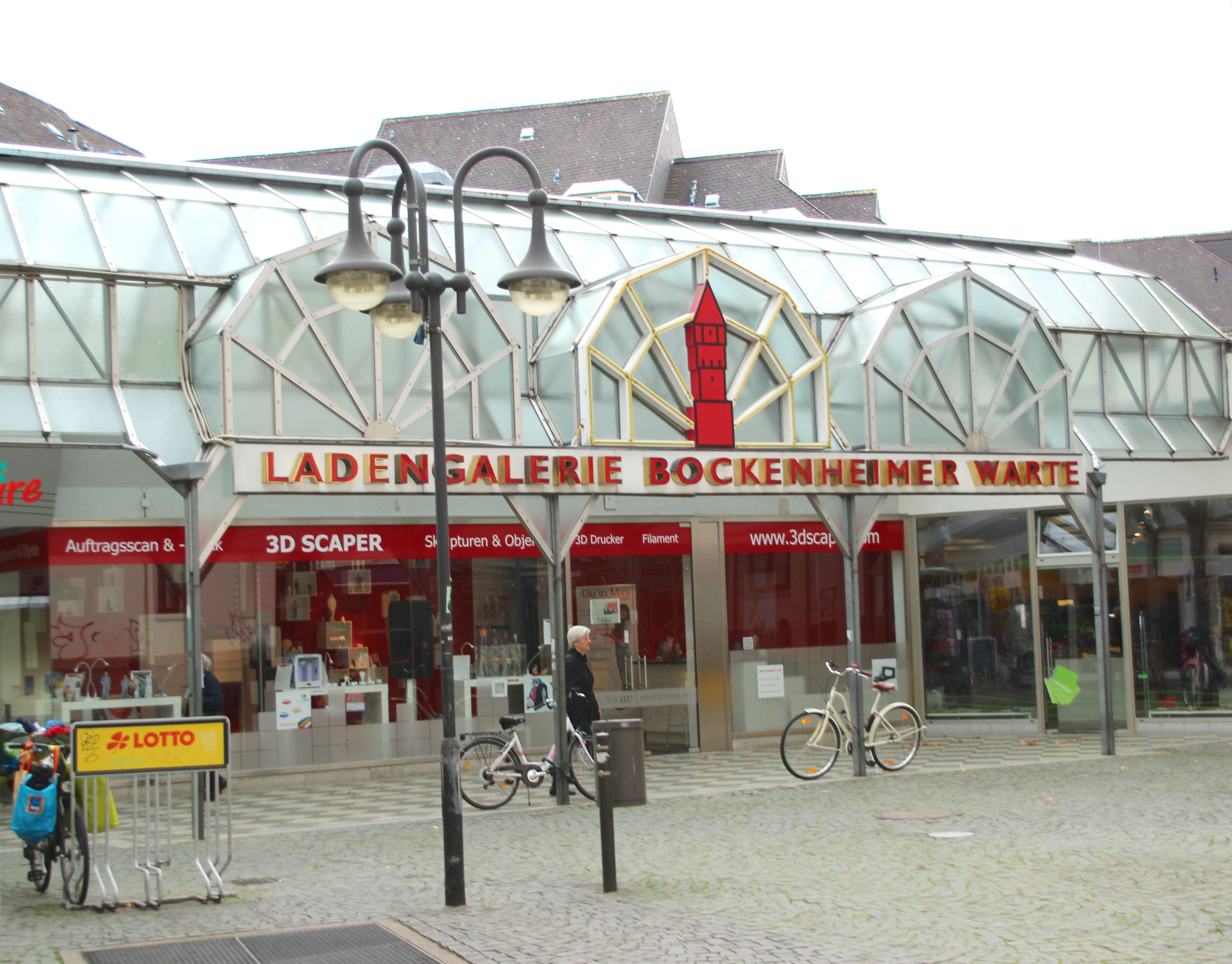 Bildinhalt: Leipziger Straße. Haupteingang der Ladengalerie Bockenheimer Warte Aufnahmeort: Frankfurt am Main, Deutschland